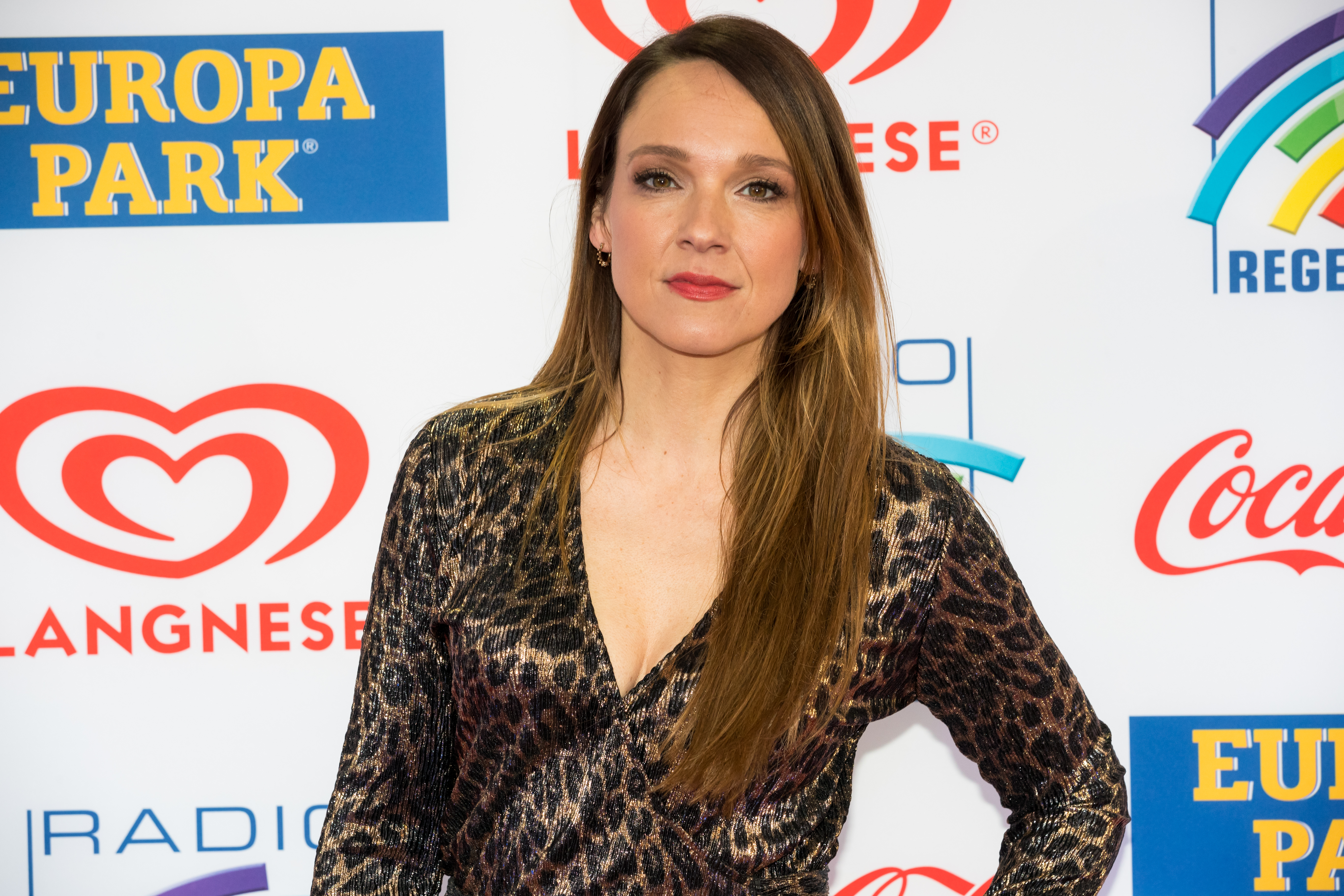 Carolin Kebekus during Radio Regenbogen Award 2019 at Europapark, Rust, Baden-Württemberg, Germany on 2019-04-12, Photo: Sven Mandel